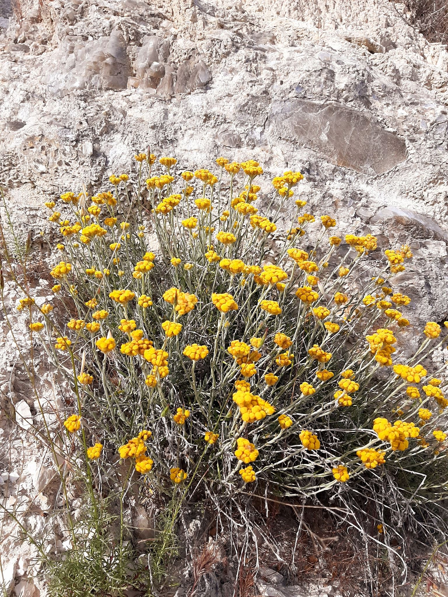 Αθάνατα ή αλλιώς δάκρυα του Χριστού